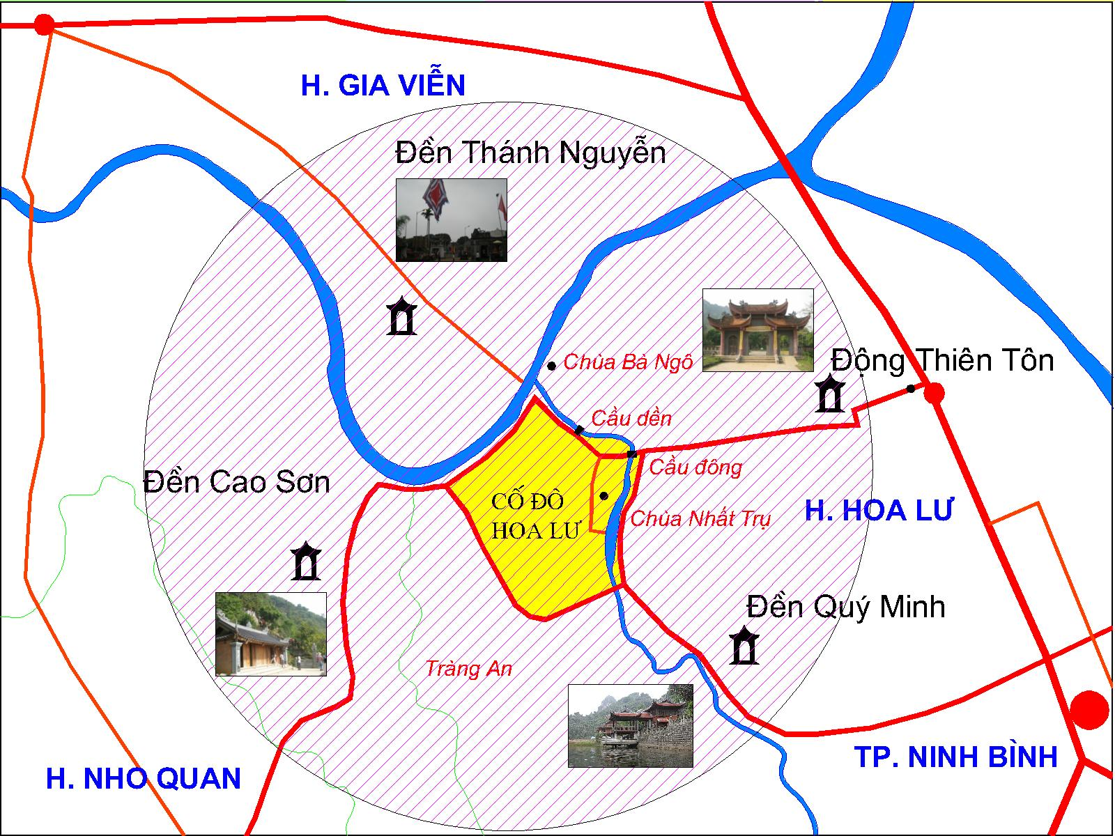 Hoa Lu Map